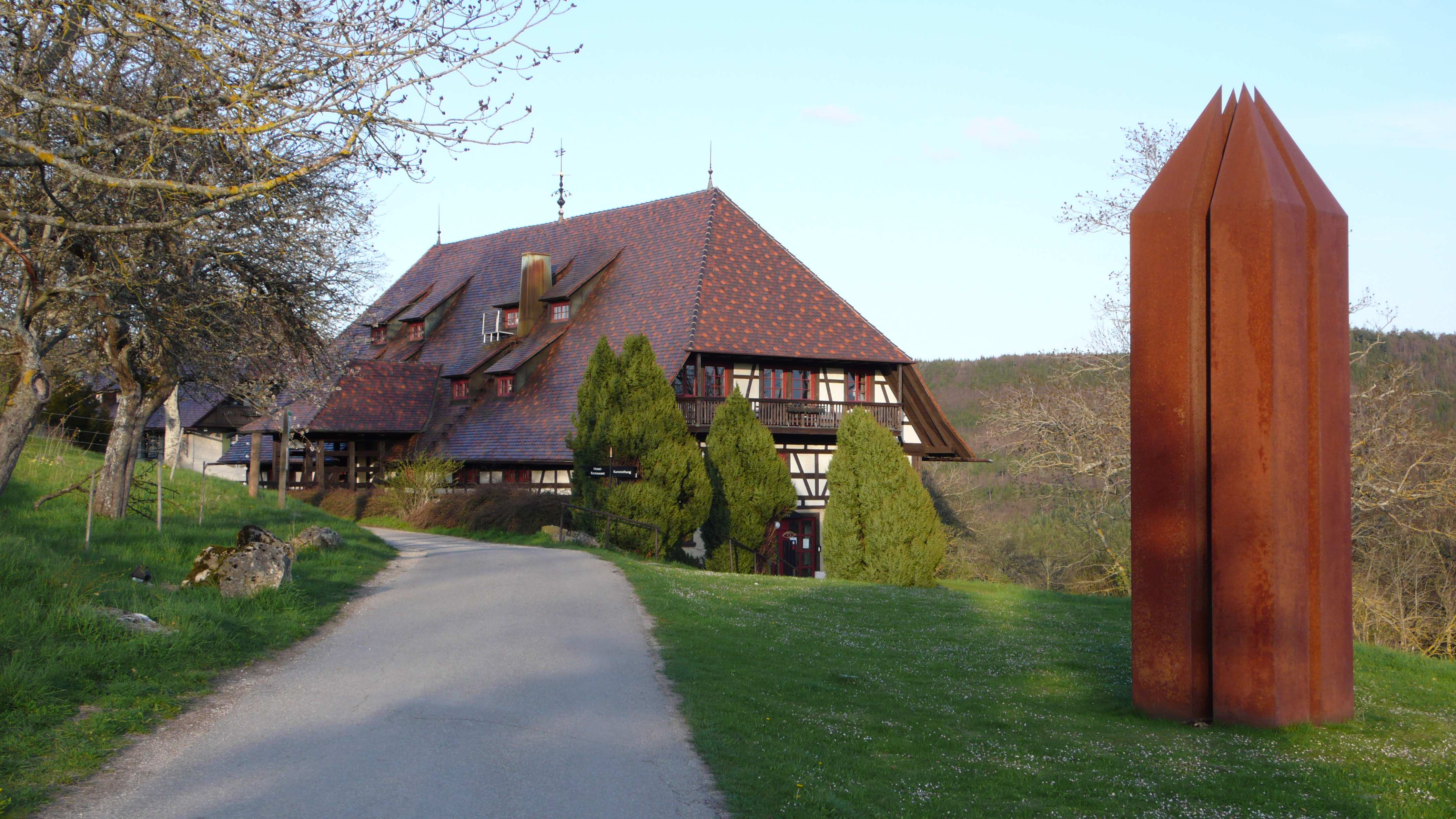 Skulptur von Jürgen Knubben - Kunstmuseum Hohenkarpfen, Hausen ob Verena, Baden-Württemberg, Germany